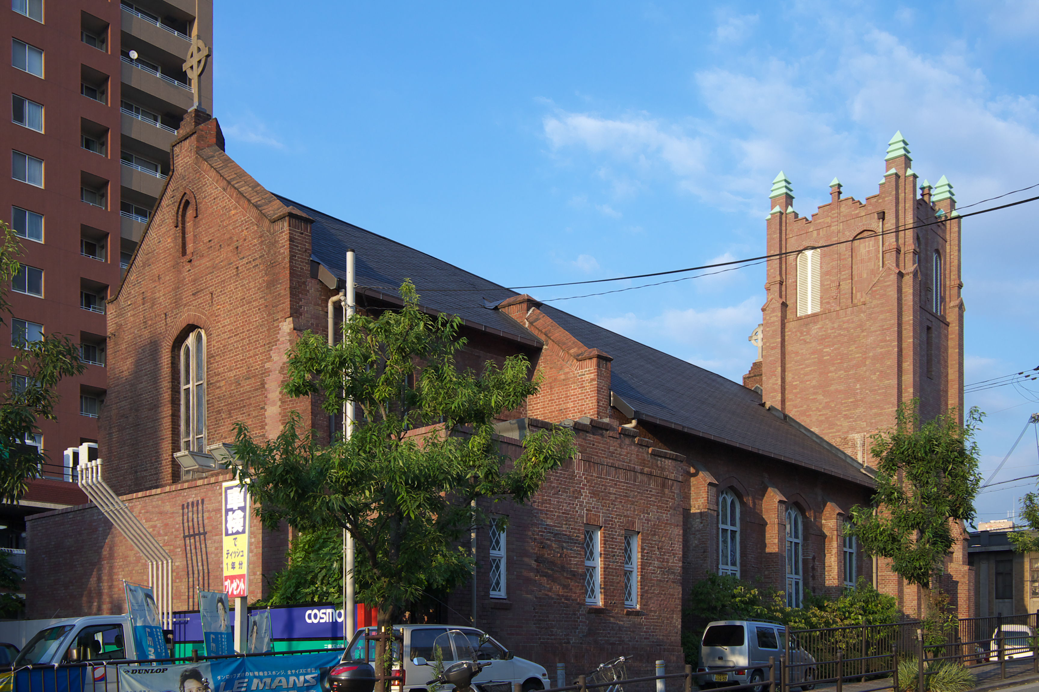 Kawaguchi Church (Osaka City) / 川口基督教会（大阪市）